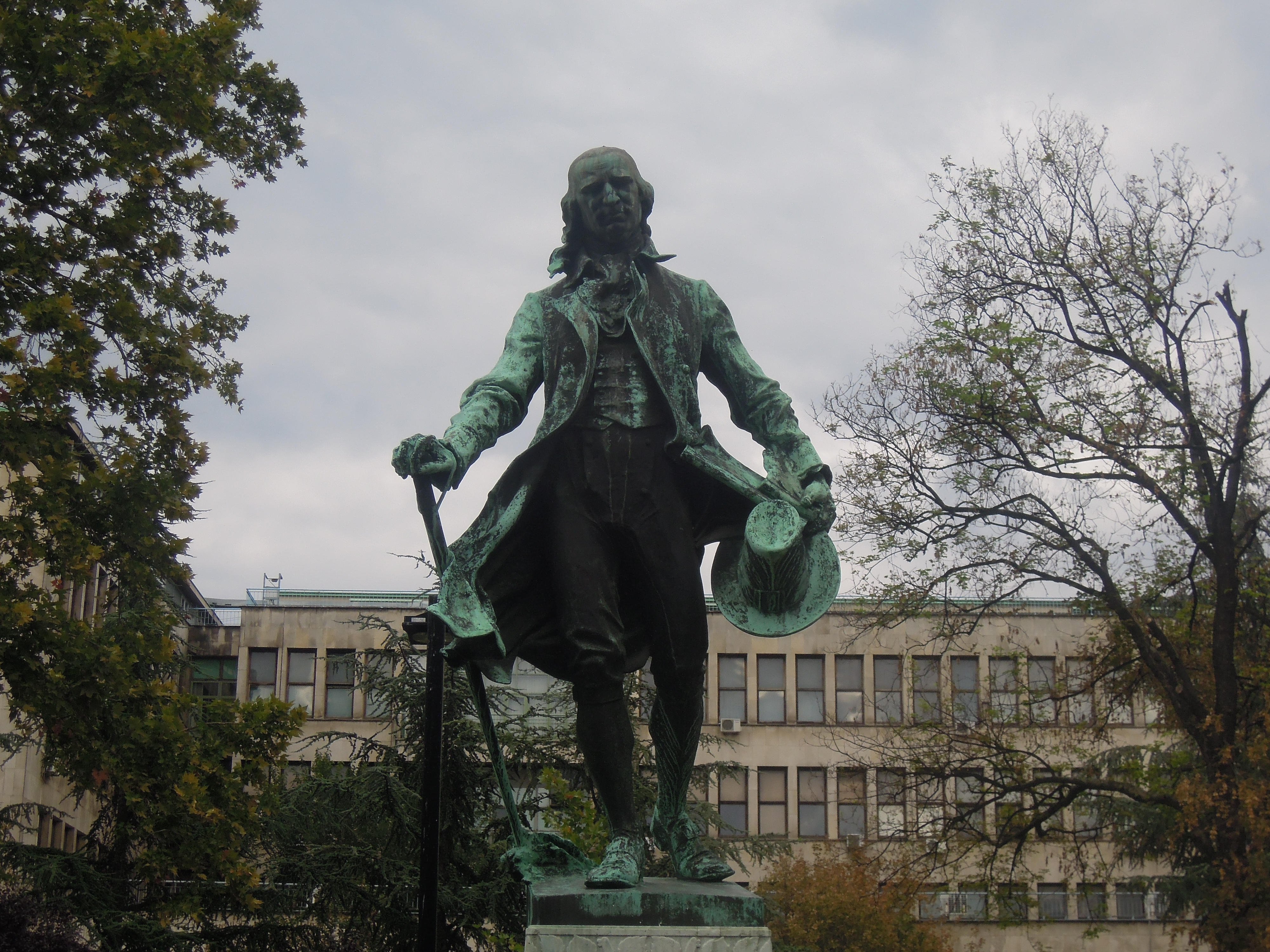 Spomenik Dositeju Obradoviću, studentski park, Beograd.